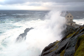 Kråkenes fyr i orkan